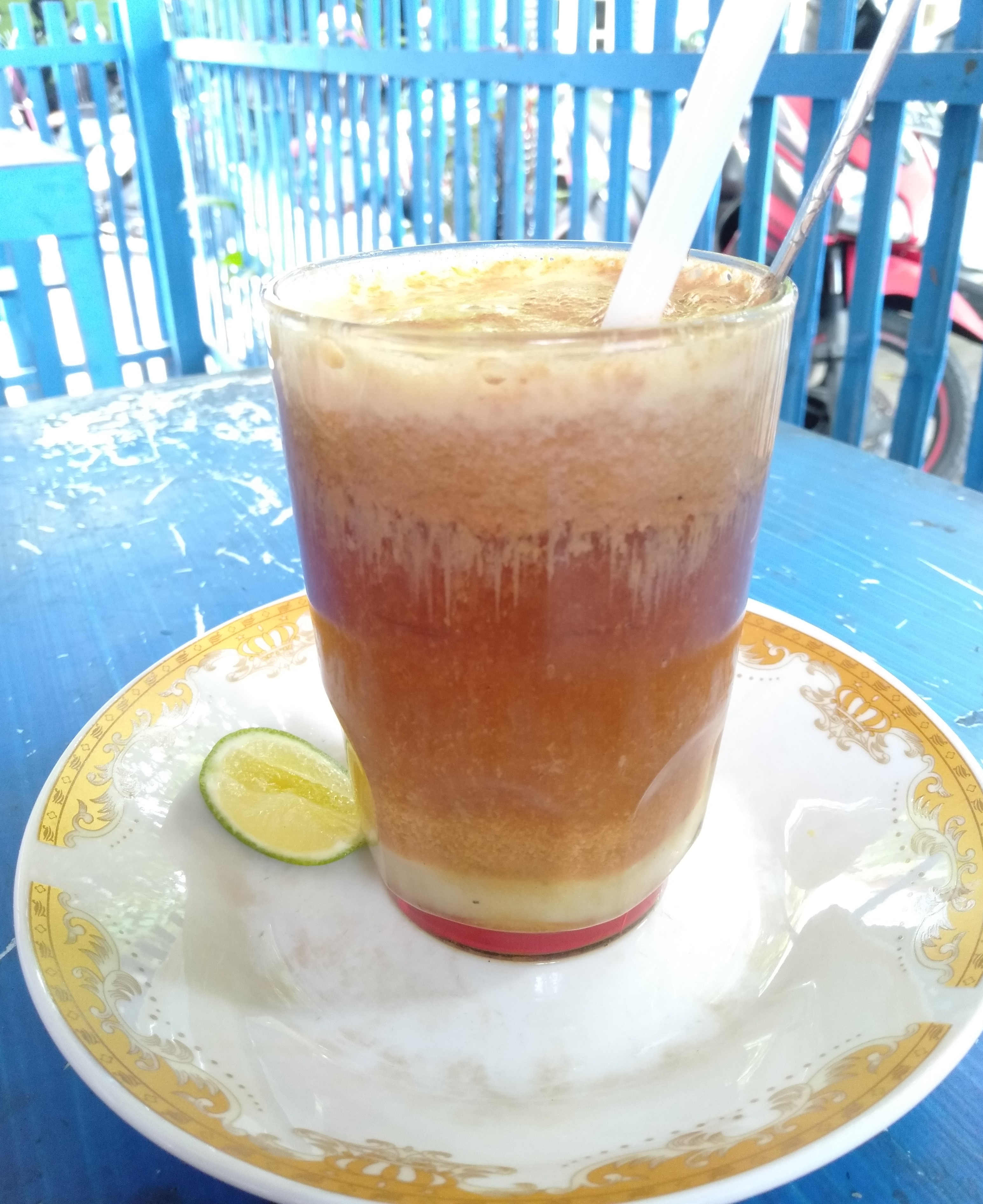 Teh talua